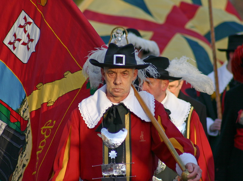 Schuttersgilde Bakel (Noord Brabant, Nederland). Foto: Jan Weijers, Helmond